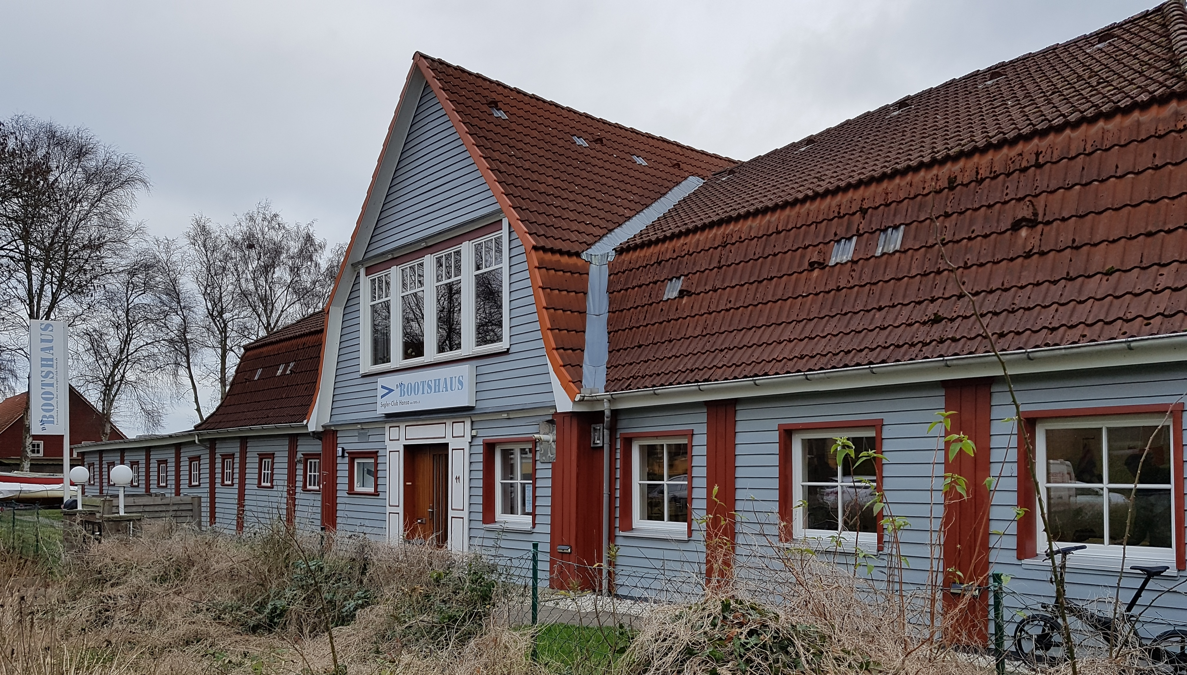 Vereinsgebäude des Seglerclubs Hansa von 1898 in Lübeck, Wakenitzufer, mit Segelschule